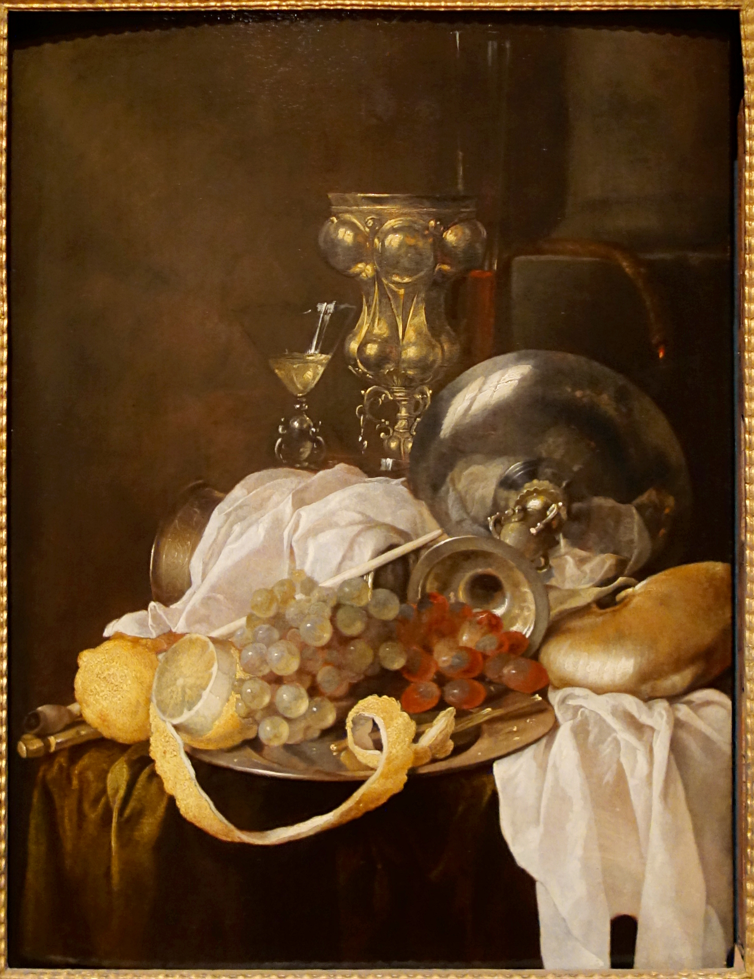 Nature morte, au musée de Cambrai.